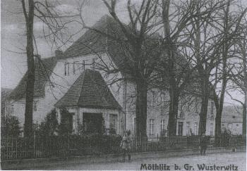 Möthlitzer Schloss, very old picture